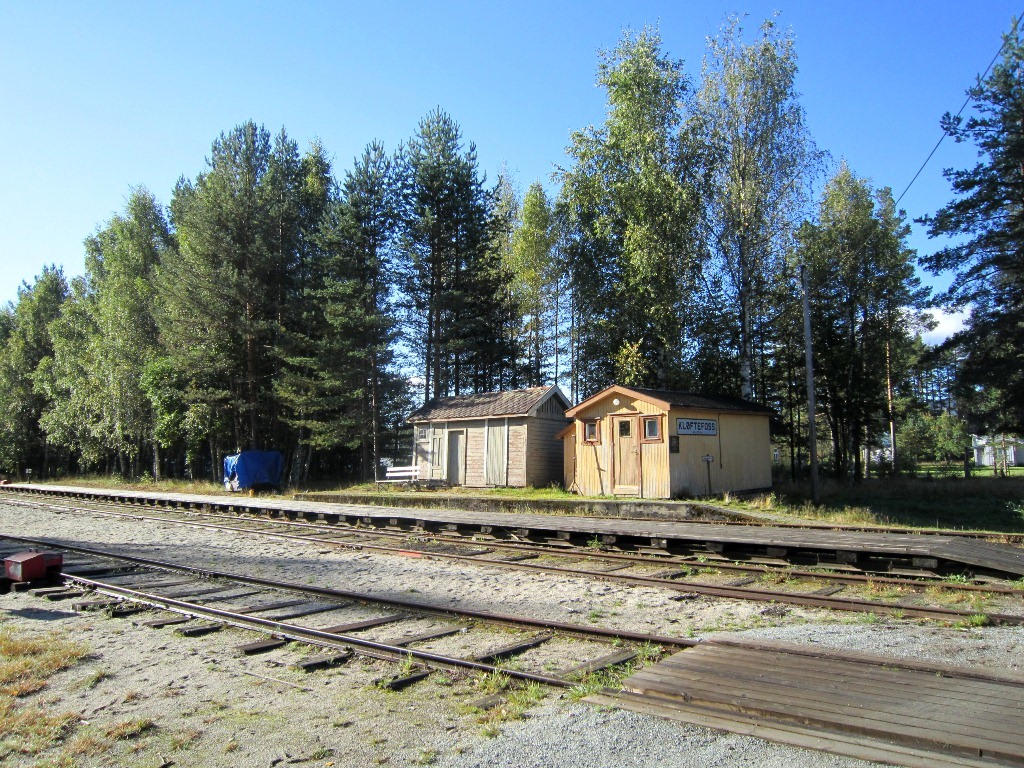 Kløftefoss stoppested på Krøderbanen